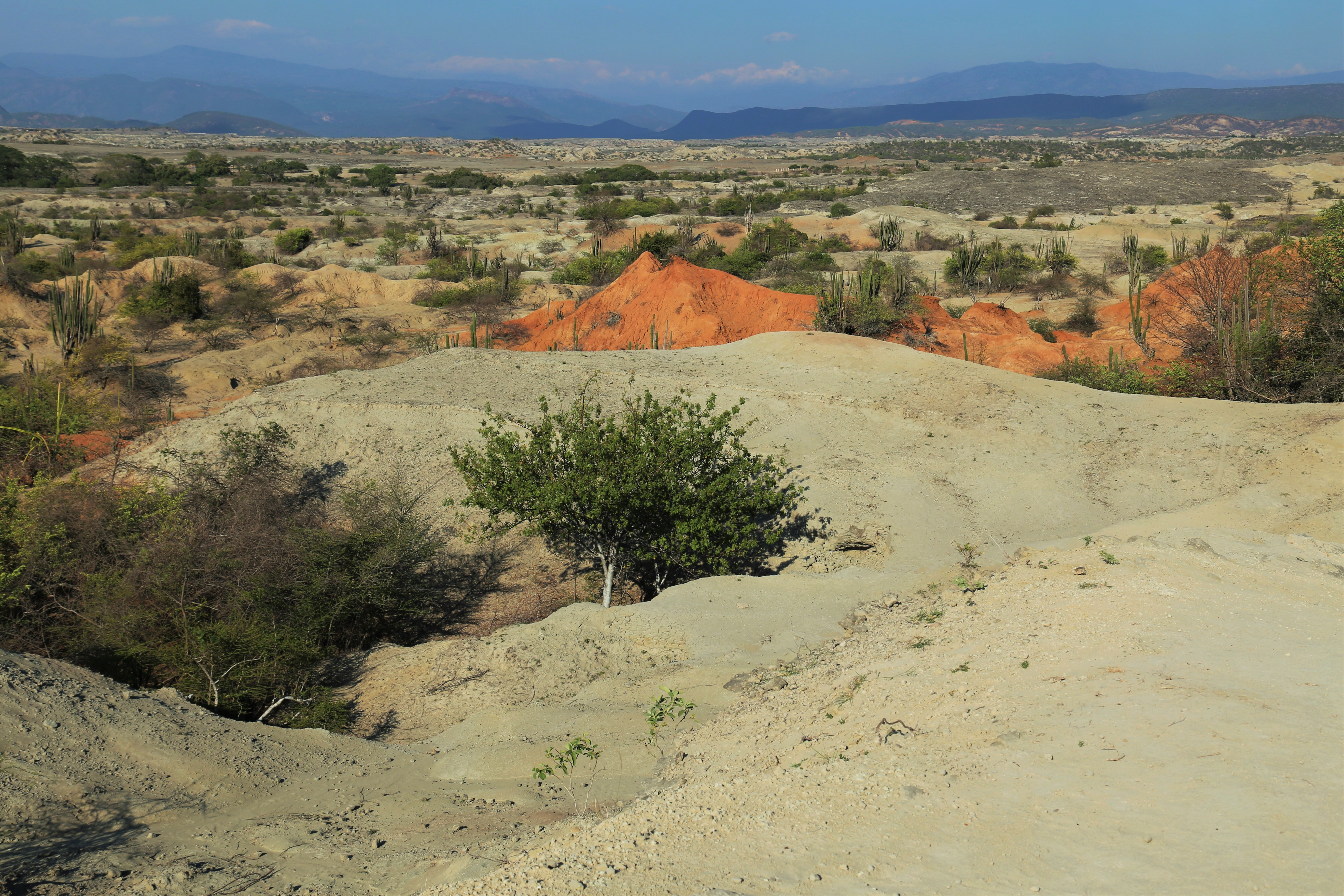 Villavieja, Huila, desierto Tatacoa